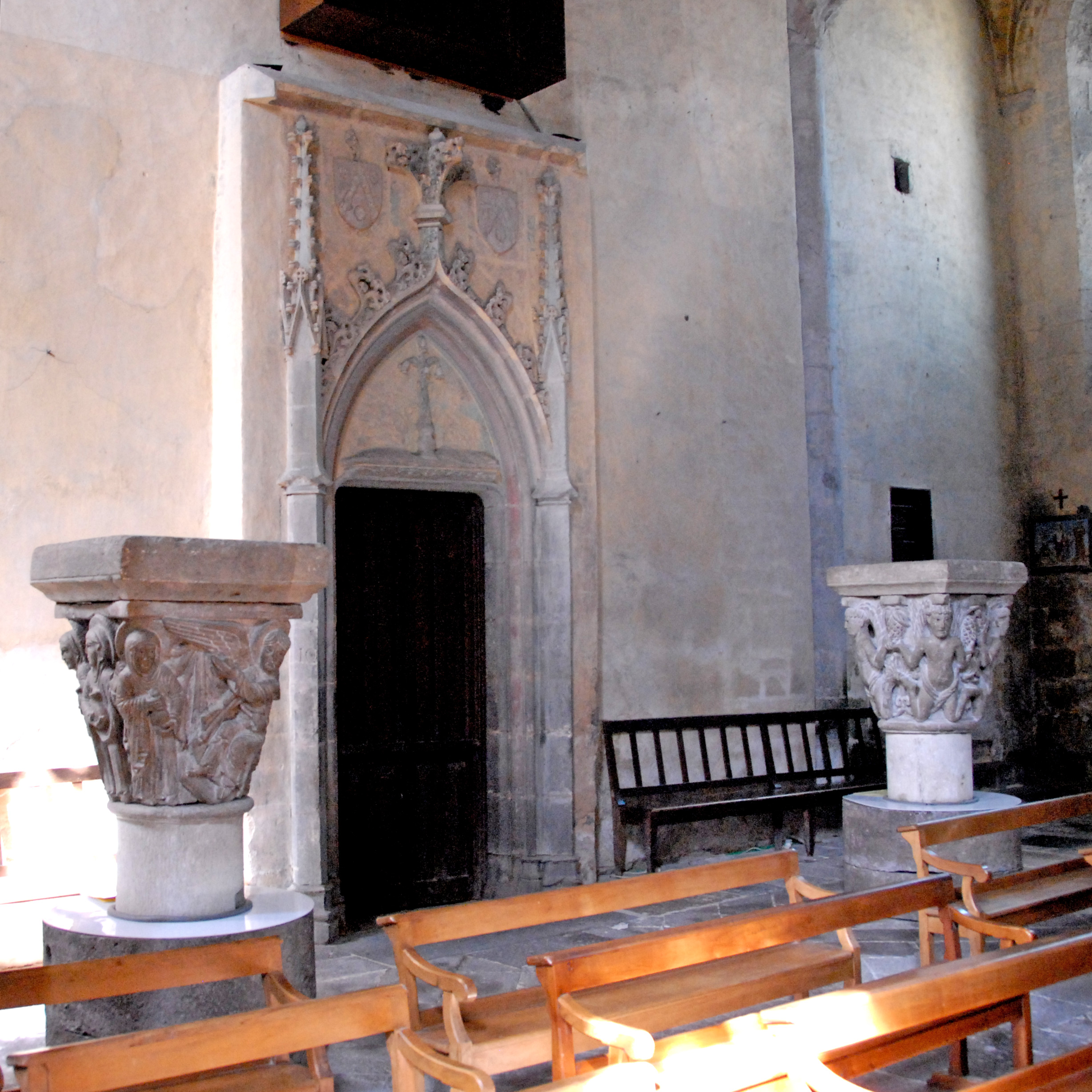 Mozac, Westwand in Joch 1